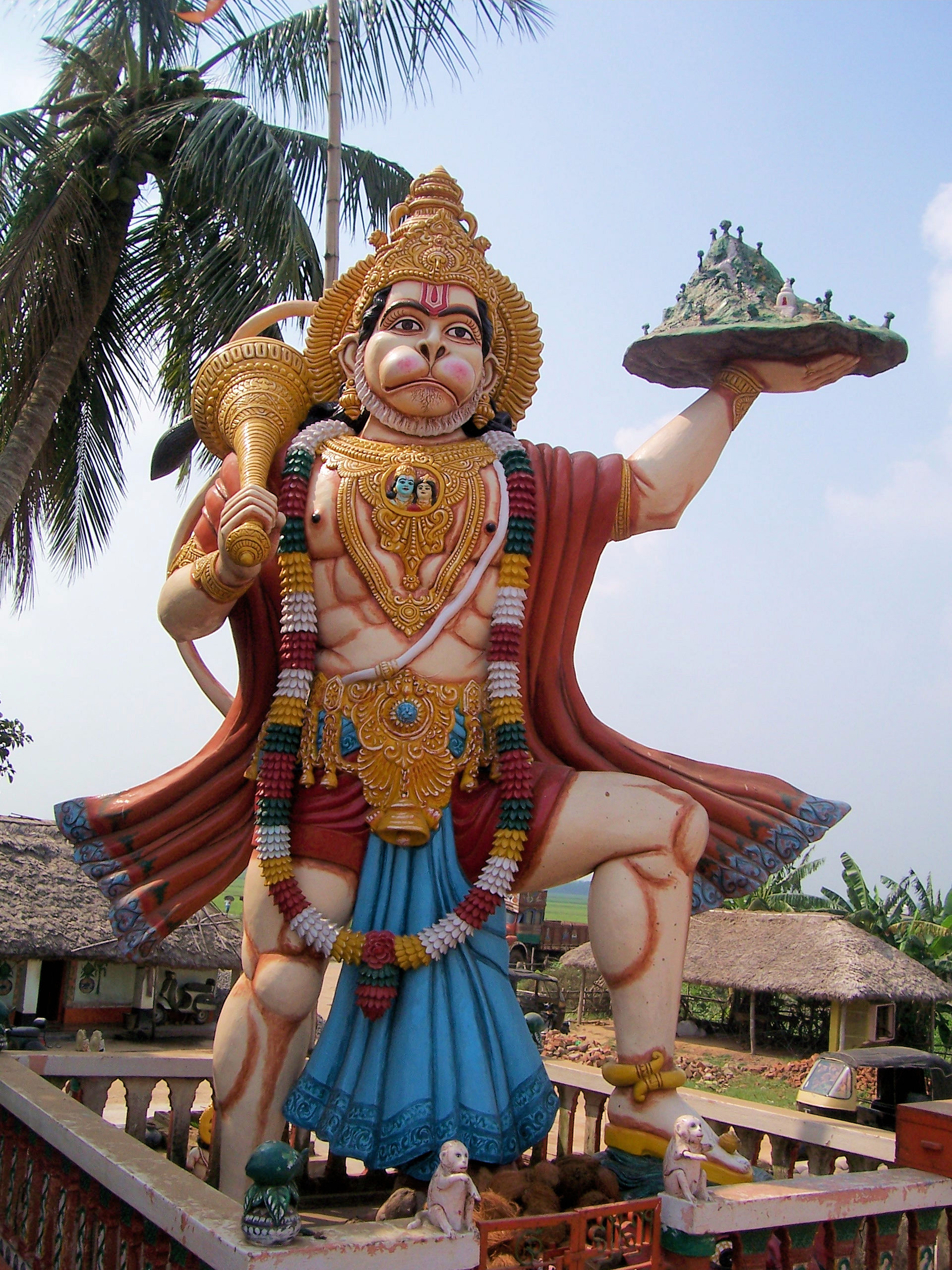 Hanuman Statue In Haladiagada, Kendrapada, Orissa, India